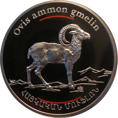 Памятная монета Армении 2008 года серии "Красная книга" "Армянский муфлон" - 100 драм - серебро 925